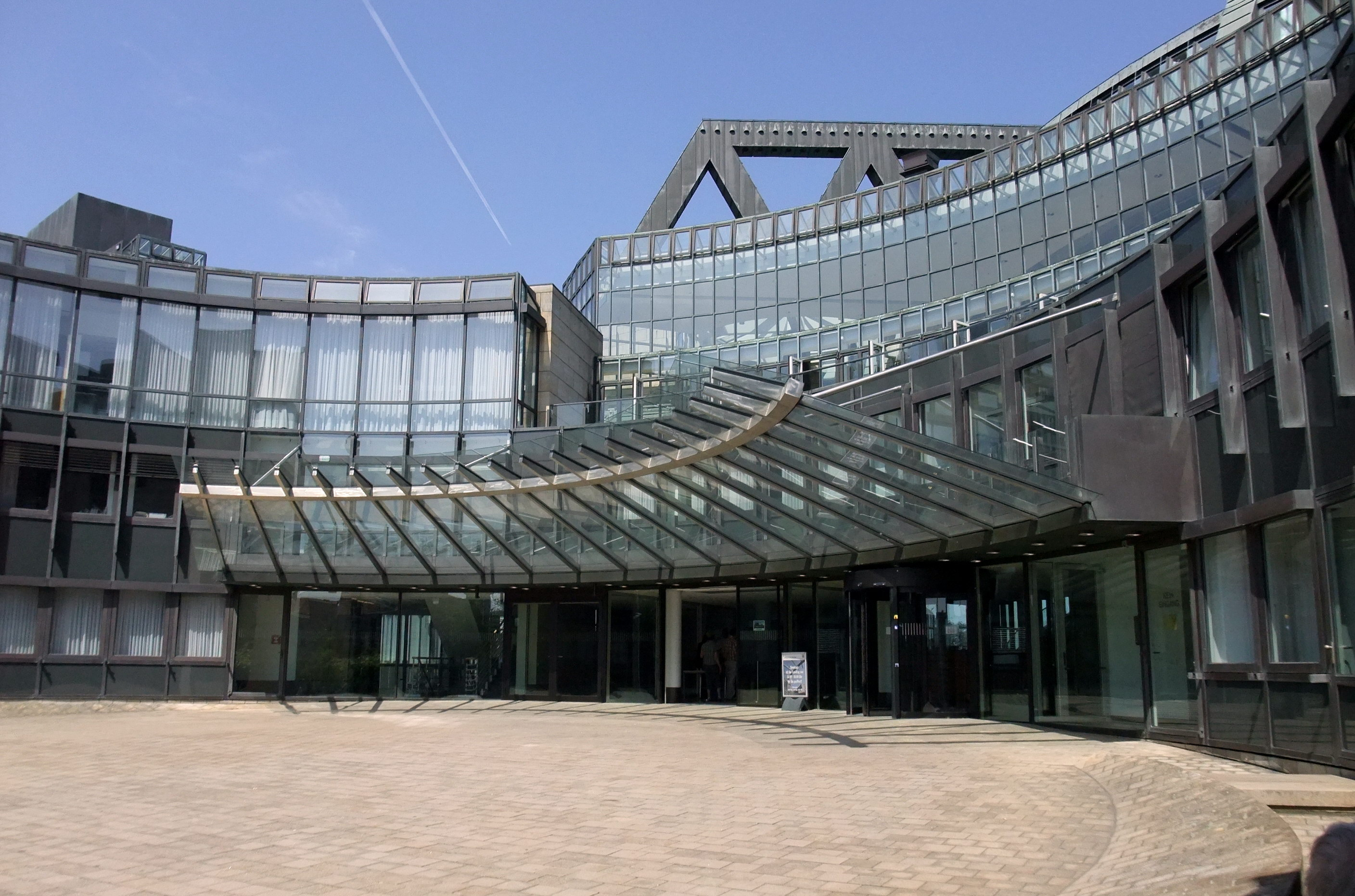 Landtag Düsseldorf